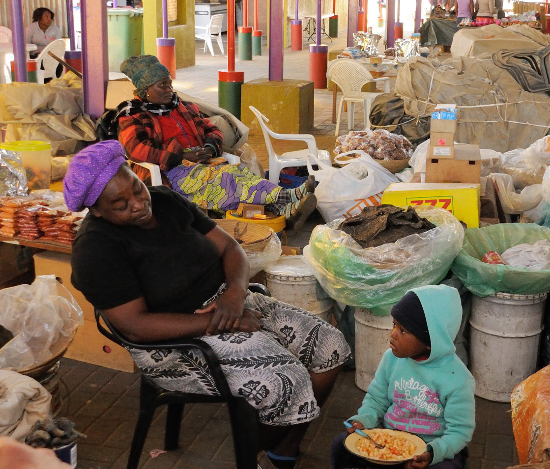 im Zentrum von Katutura findet man einen Markt für Waren verschiedenster Art und Fleisch, welches hier auch zerlegt wird.